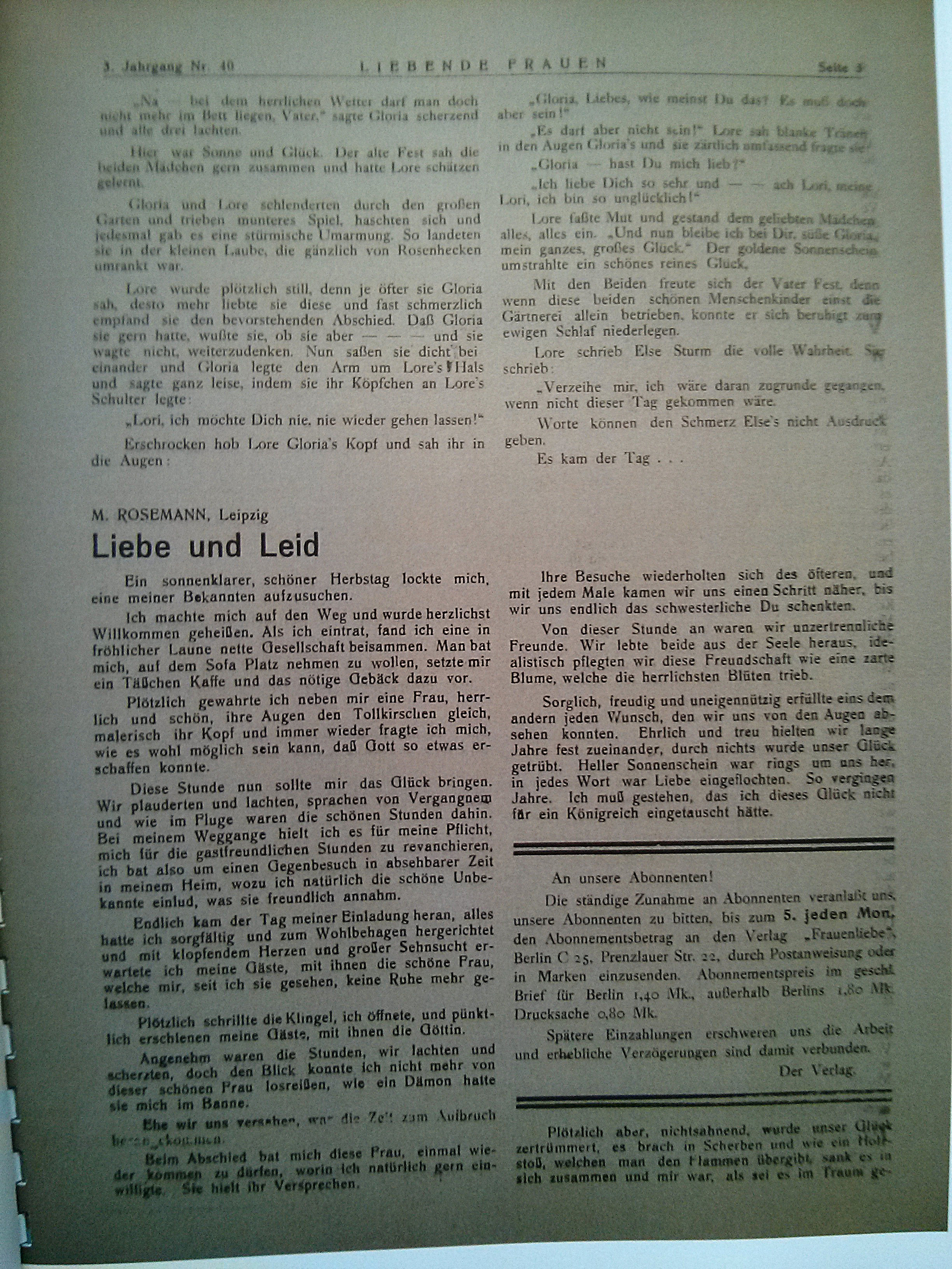 Aus der lesbischen Zeitschrift "Liebende Frauen", Berlin, 1928, Seite 9 Ausgabe 40